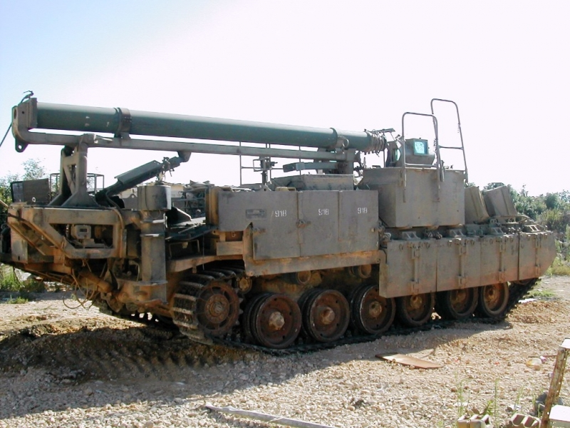 נגמפו"פ - רכב תצפית כבד המבוסס על נגמחו"ן רשות ניתנה לשימוש הוגן בתמונה בויקיפדיה, תוך מתן קרדיט ליוצר התמונה. התמונה הועלתה לפורום צבא וביטחון בFresh והיא נמצאת באשכול רק"מ ישראלי מעניין, זהו צילום שצילם strong11 ונתן לי אישור מפורש להשתמש בו בוויקיפדיה ולהעלותו תחת GFDL.